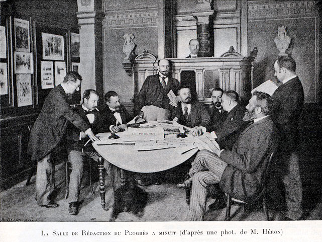 Distinguierte Herren in repräsentativen Räumlichkeiten: die Redaktion der französischen Tageszeitung Progrès (Lyon) im Jahr 1894